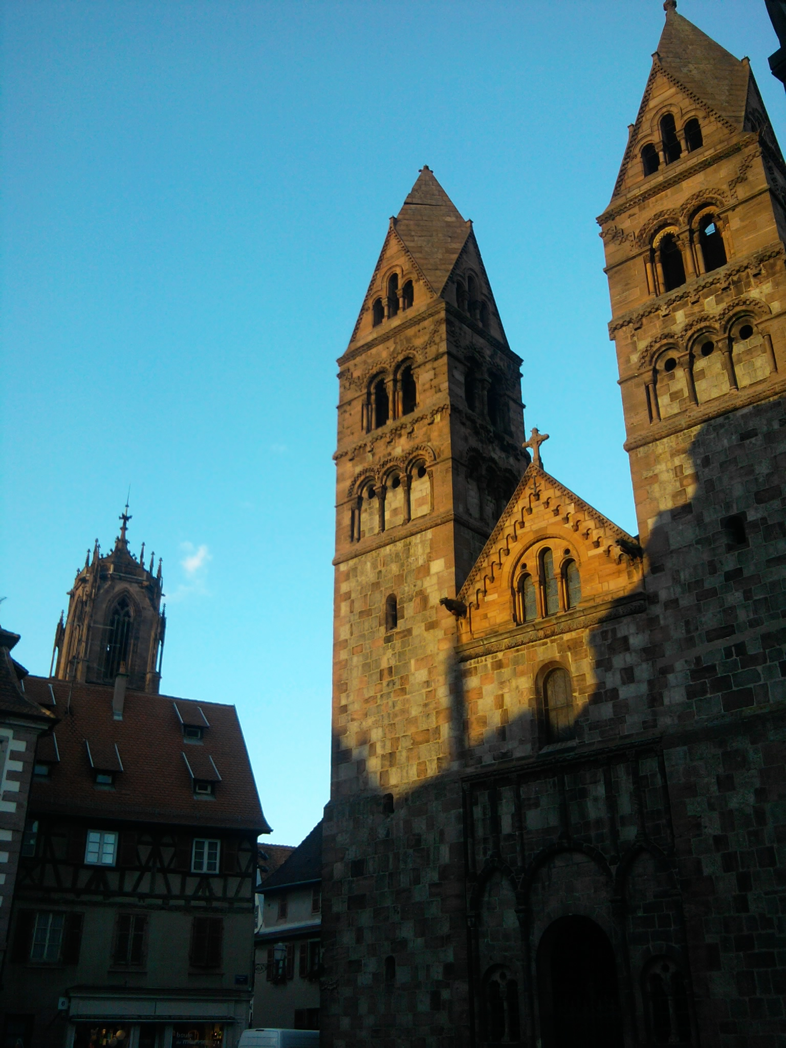 Sélestati templomok (Elzász, Franciaország)